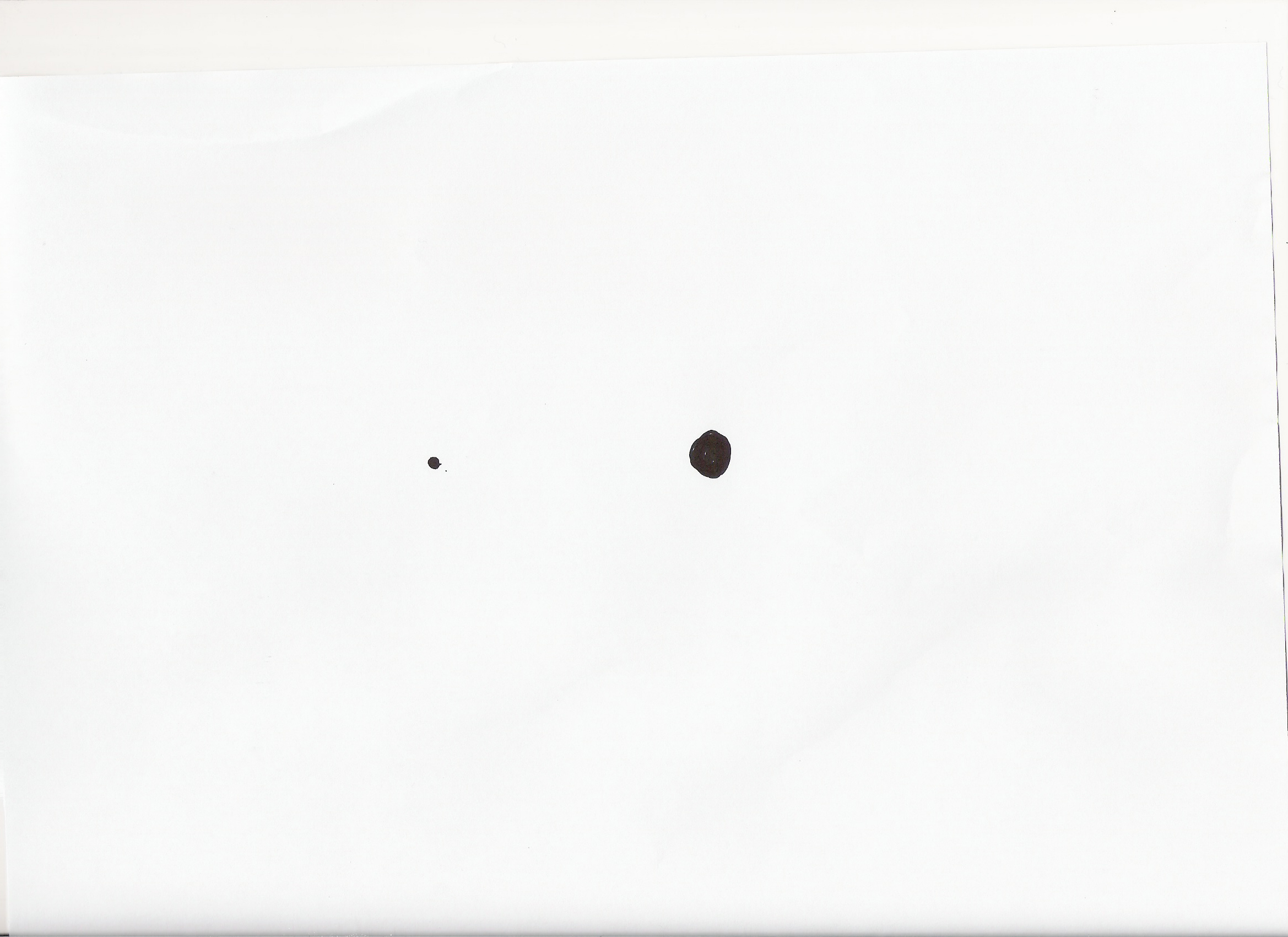 Punto ciego. Experiment painted by me for verify it. Experimento dibujado por mí para verificarlo. →JMB (My talk) 14:59, 21 July 2006 (UTC)